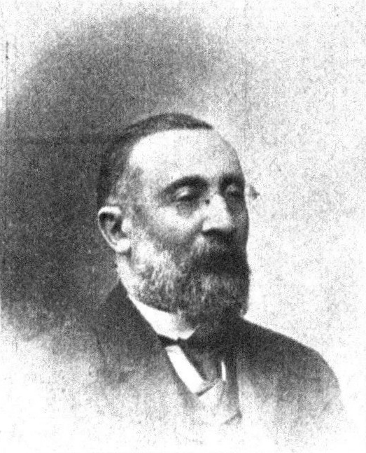 Österreichischer Politiker, Reichsratswahl 1907, Name siehe Dateiname